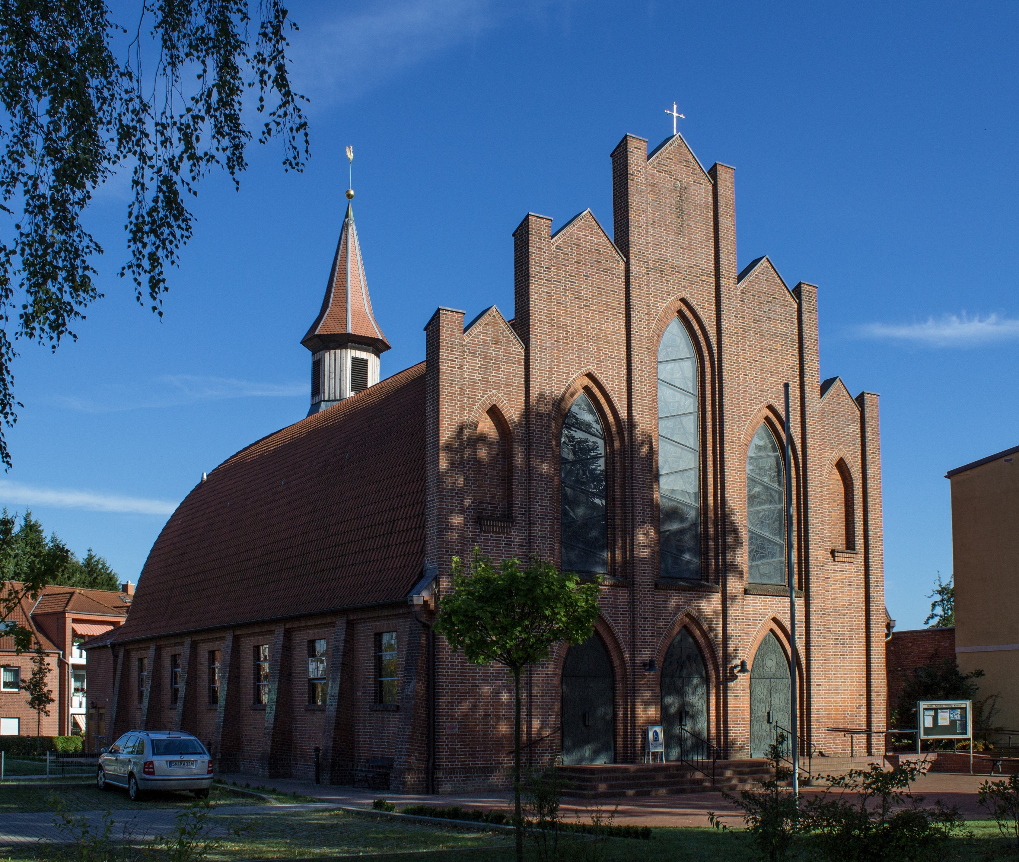 Waren (Müritz), kath. Kirche Heilig Kreuz